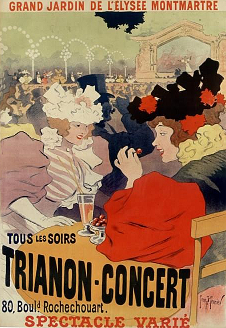 Grand jardin de l'Elysée-Montmartre. Tous les soirs, Trianon-Concert, 80 Boul. Rochechouart : affiche